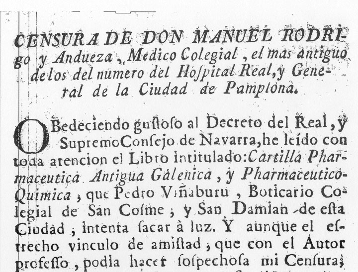 censura de andueza en viñaburu